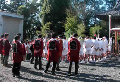 静岡県牧之原市細江で催される神明神社の御船神事